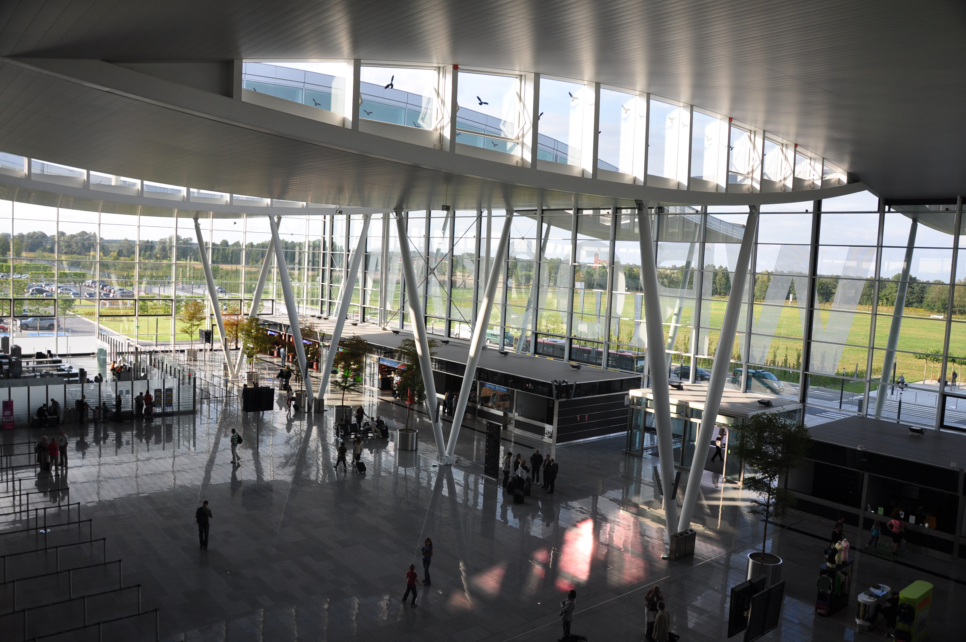 Lotnisko we Wrocławiu. Terminal T2.